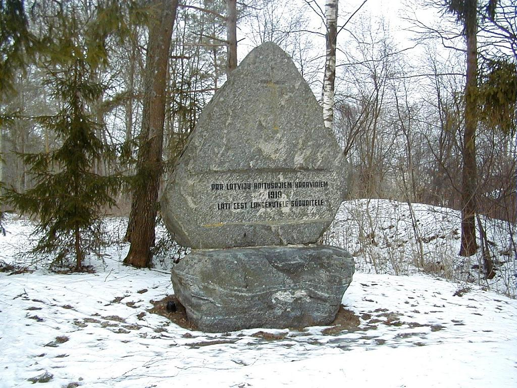 Juglas kauju piemineklis 2003-03-02